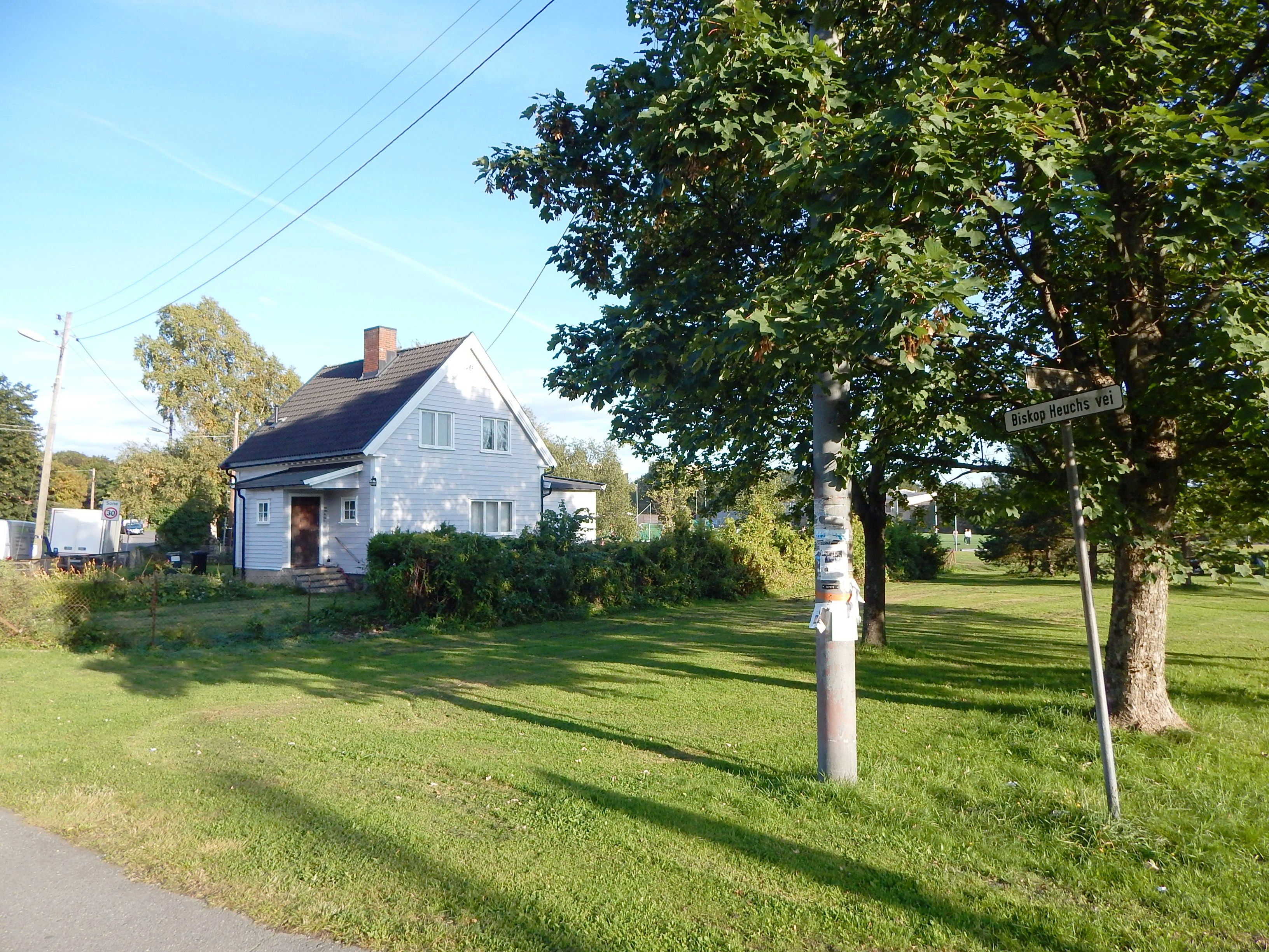 Biskop Heuchs vei nær Tåsenveien